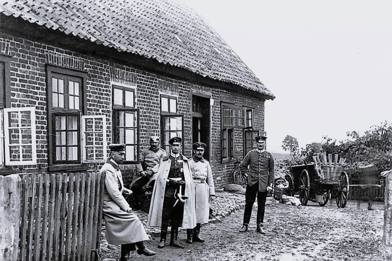 Karl-Eduard von Sachsen-Coburg und Gotha Herzog Karl-Eduard von Sachsen-Coburg und Gotha mit Stab im Manöver Information added by Wikimedia users.Carl Eduard mit seinem Stab im Manöver vor ihrem Quartier bei Windmüller Johann Warnk [Köchelstorf bei Rehna/Mecklenburg, 14. September 1904] (Siehe: Harald Sandner:Hiters Herzog - Carl Eduard von Sachsen-Coburg und Gotha - Die Biographie. Shaker Media, Aachen 2011, ISBN 978-3-86858-598-8. S.42)